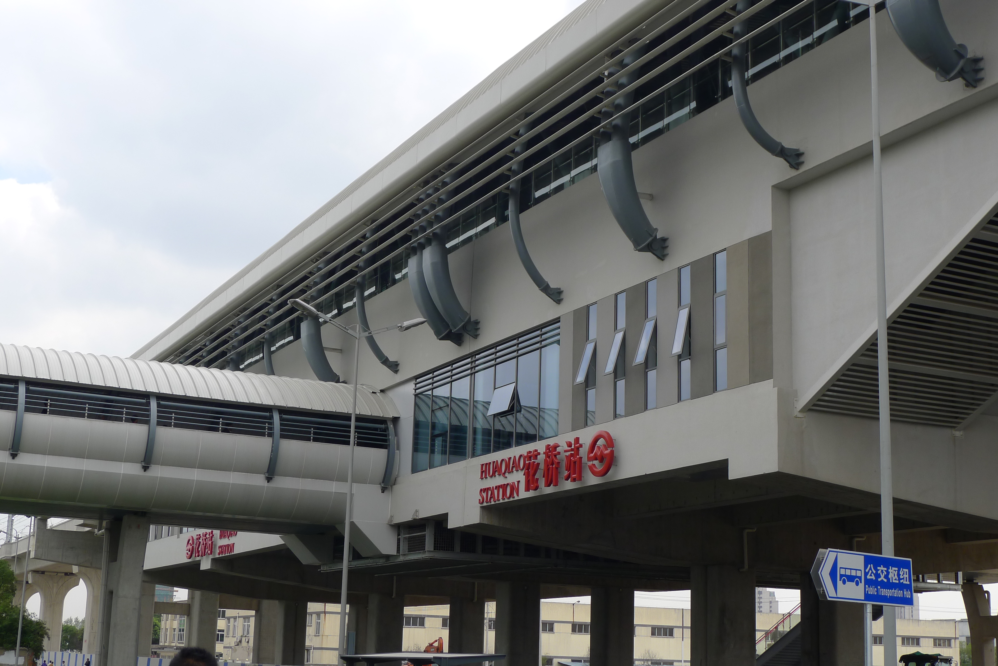 上海轨道交通11号线花桥站。